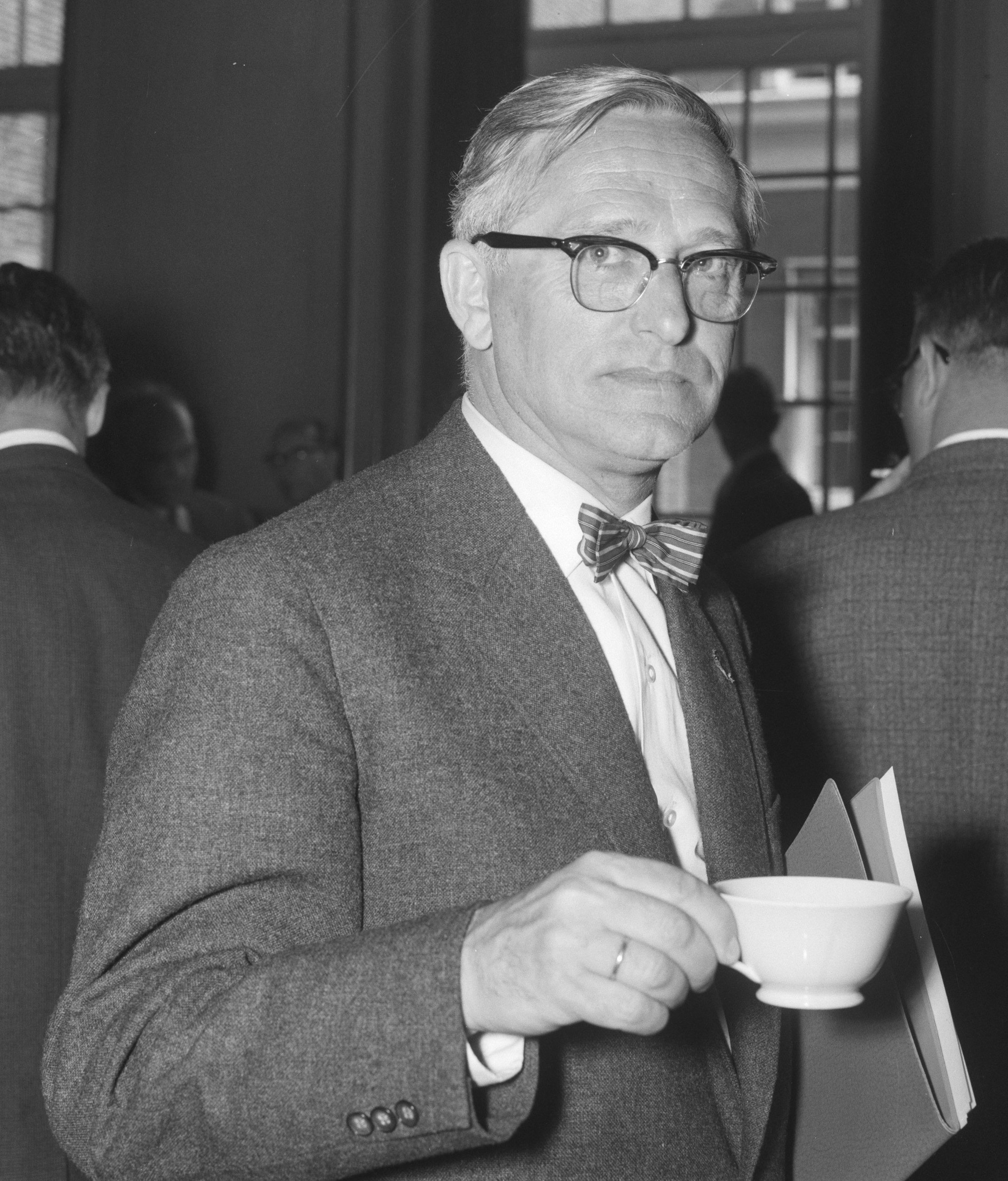 Collectie / Archief : Fotocollectie Anefo Reportage / Serie : [ onbekend ] Beschrijving : Definitieve ontwerp van nieuw stadhuis. Professor ir. J. I. Berghoef Datum : 28 juni 1961 Trefwoorden : ontwerpen, stadhuizen Persoonsnaam : Professor ir. J. I. Berghoef Fotograaf : Bilsen, Joop van / Anefo Auteursrechthebbende : Nationaal Archief Materiaalsoort : Negatief (zwart/wit) Nummer archiefinventaris : bekijk toegang 2.24.01.04 Bestanddeelnummer : 912-6618